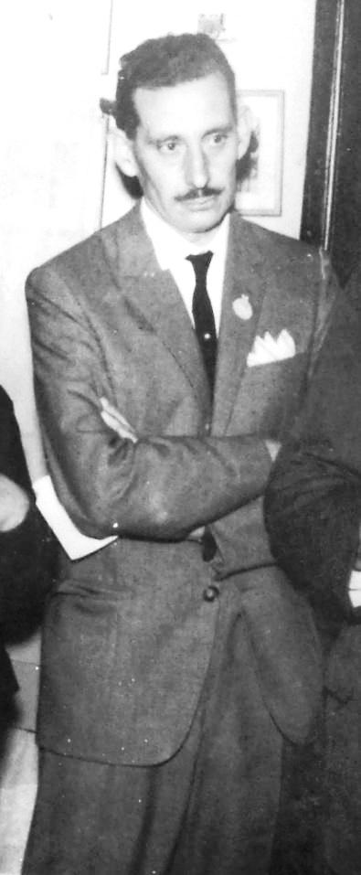 Nicolás Barrios Lynch, 1968, Libri Foundation, evento en Villa Ocampo (museo), San Isidro, Argentina.